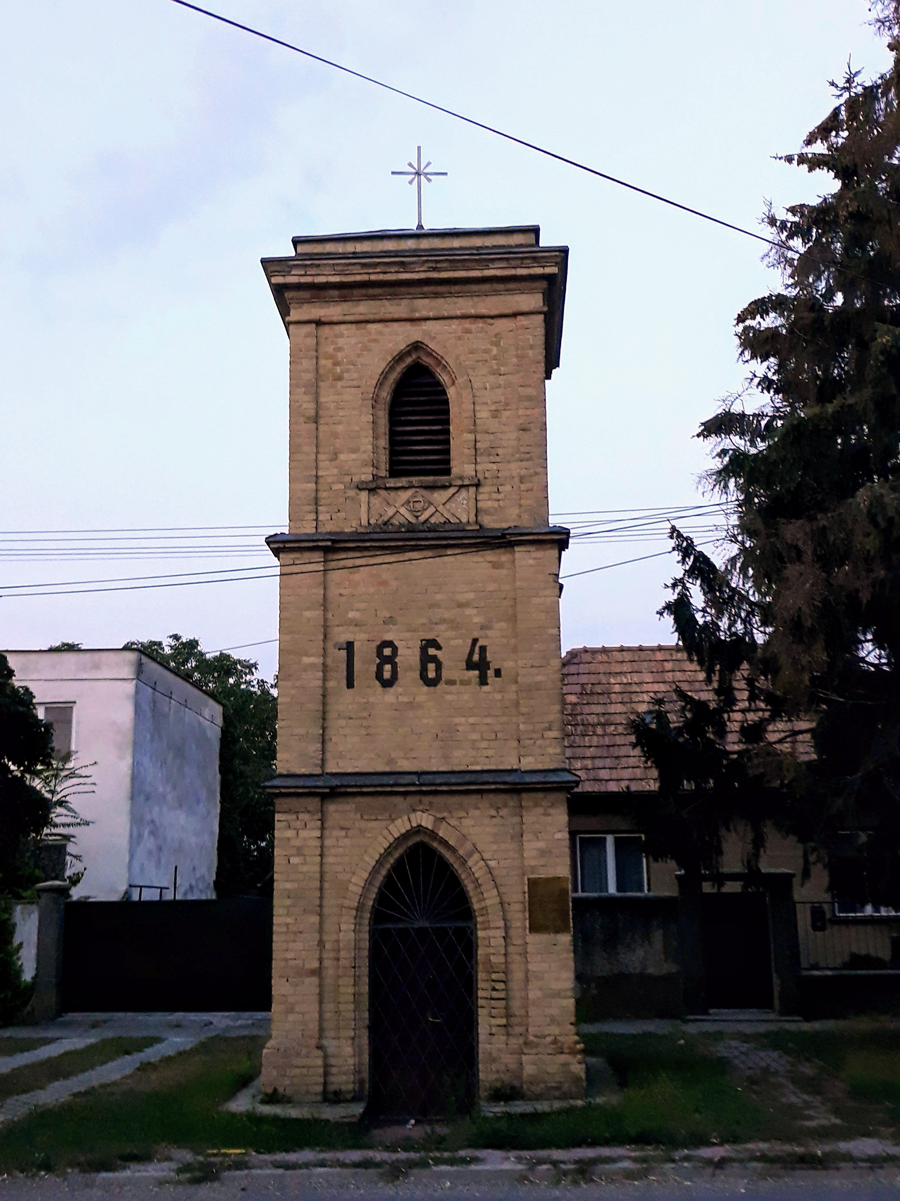 A harangláb Torcson.